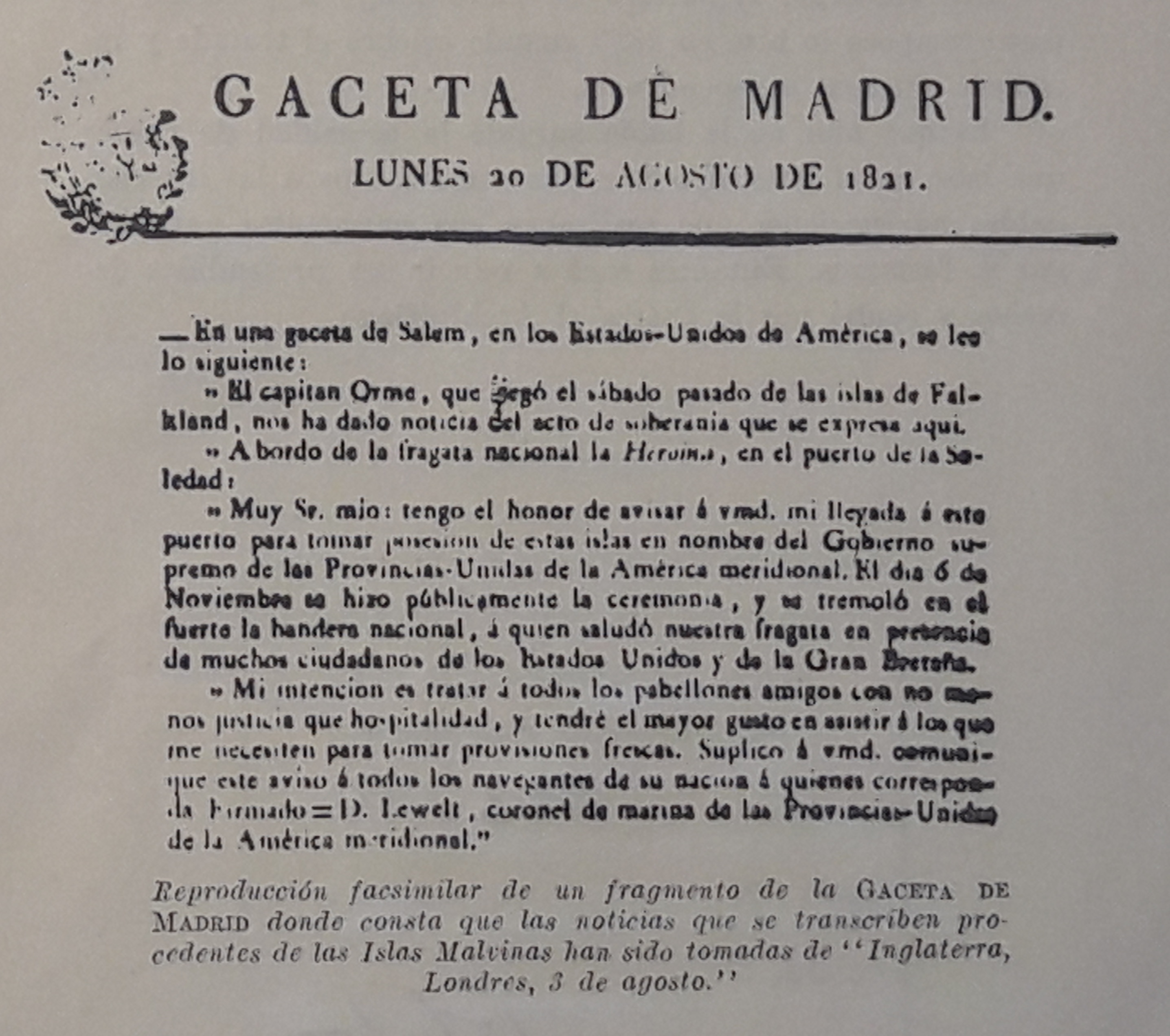 Gaceta de Madrid - Toma de posesión argentina de Malvinas.